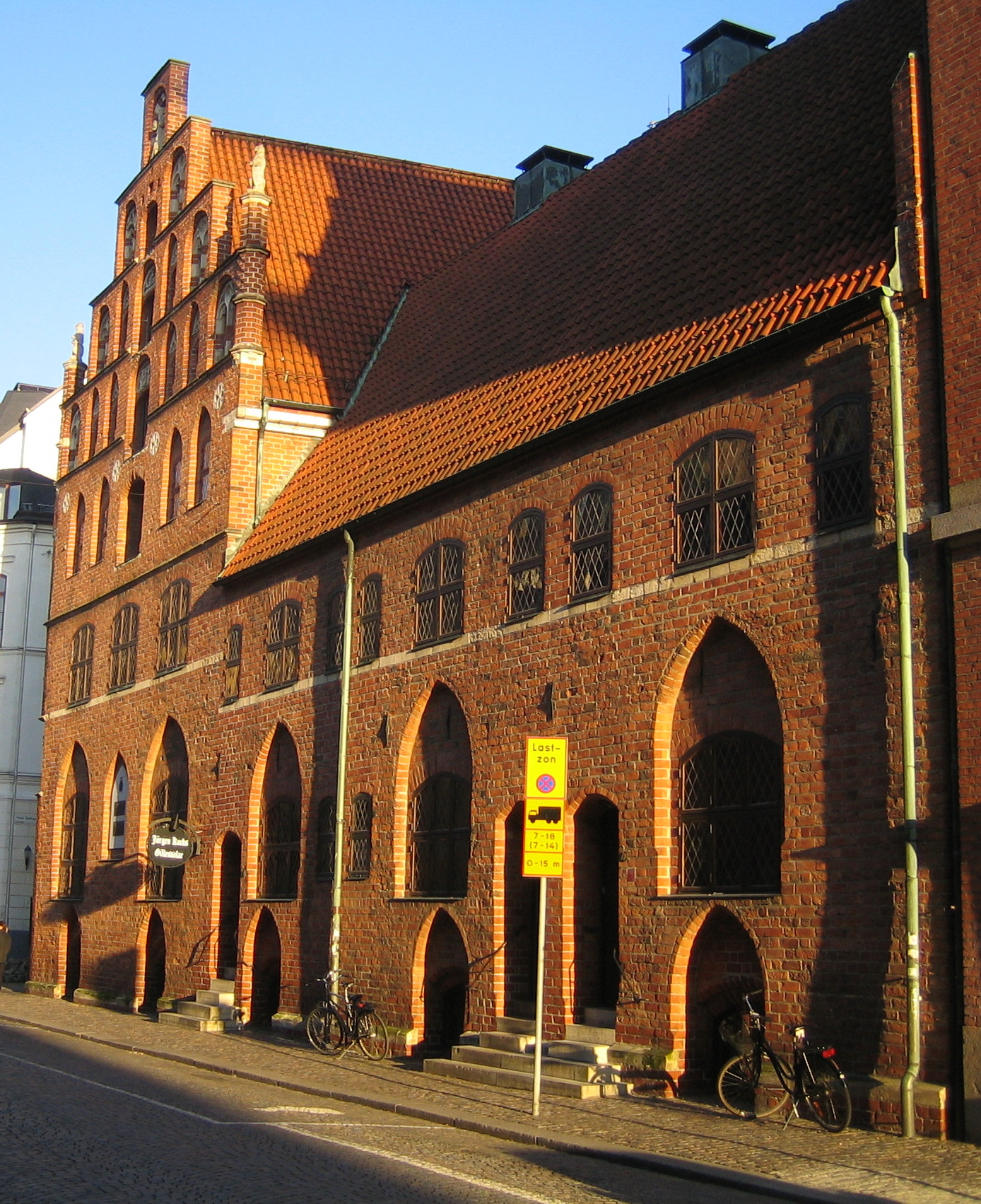 Jörgen Kocks house in Malmö, Sweden